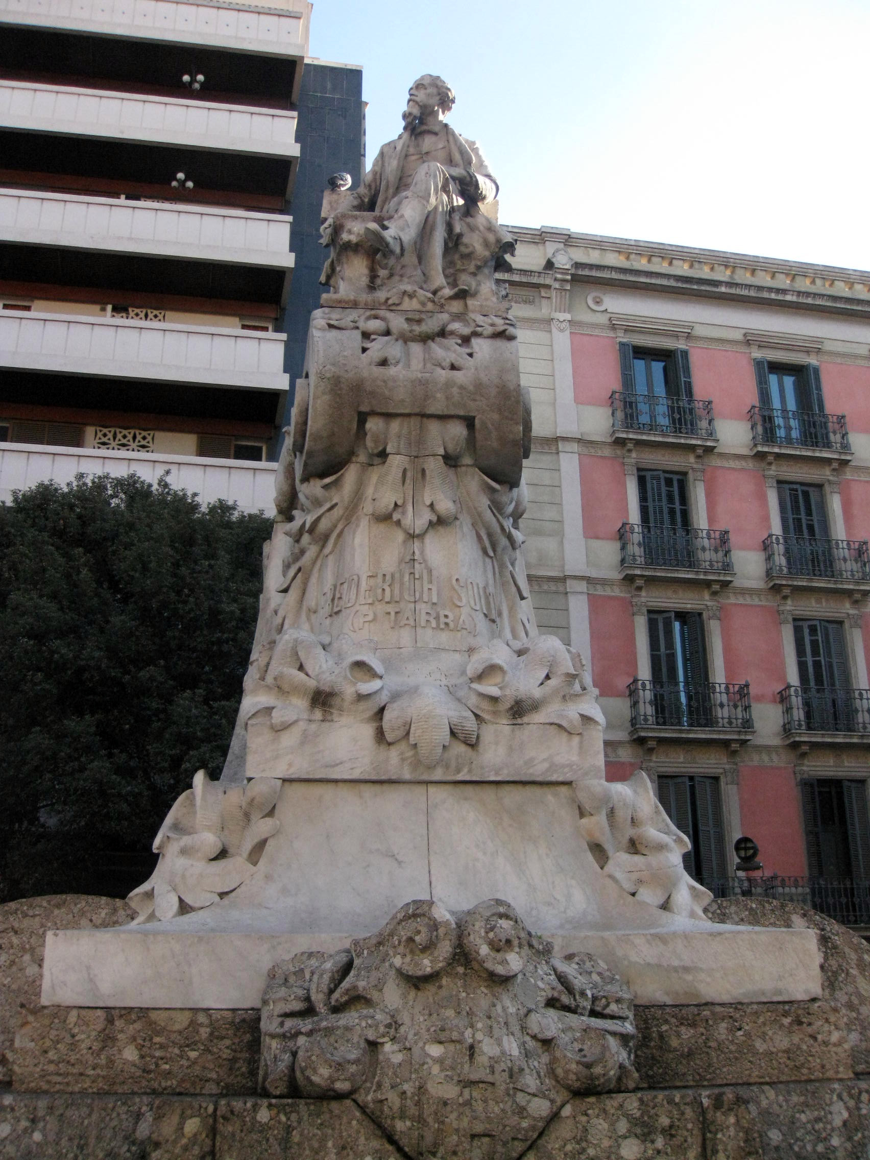 A Frederic Soler (Agustí Querol). Pl. del Teatre (Barcelona)